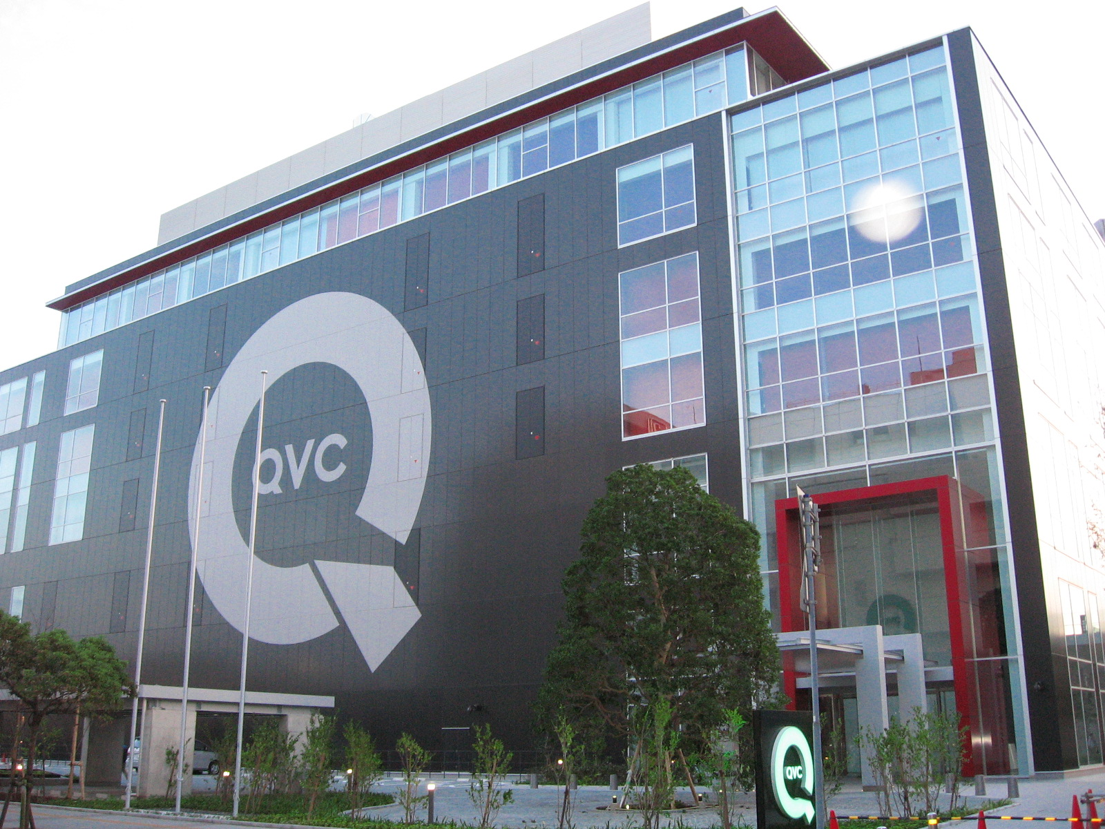 通信販売業「QVCジャパン」の本社（千葉市美浜区）。